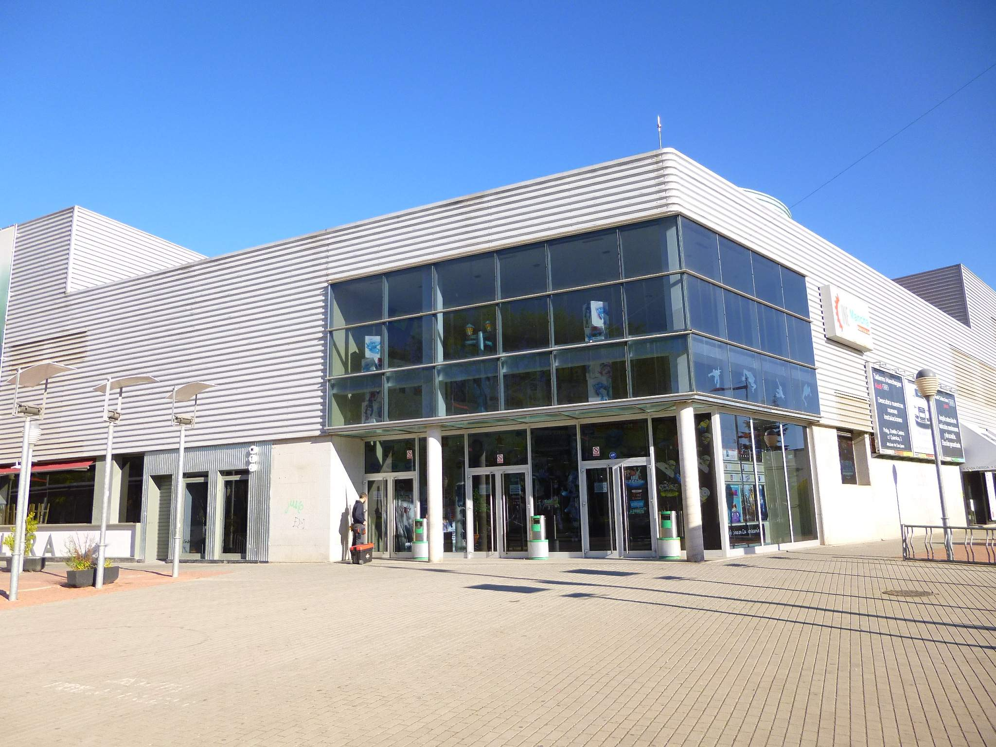 Multicines Cinemancha en Alcázar de San Juan (Ciudad Real)